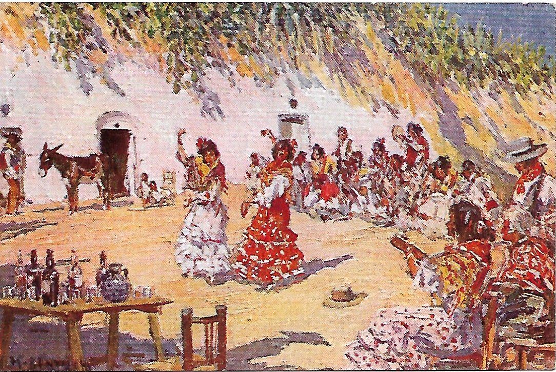 Cartolina postale riproducente il quadro "Zambra gitana" (Frastuono gitano) opera di Mariano Bertuchi